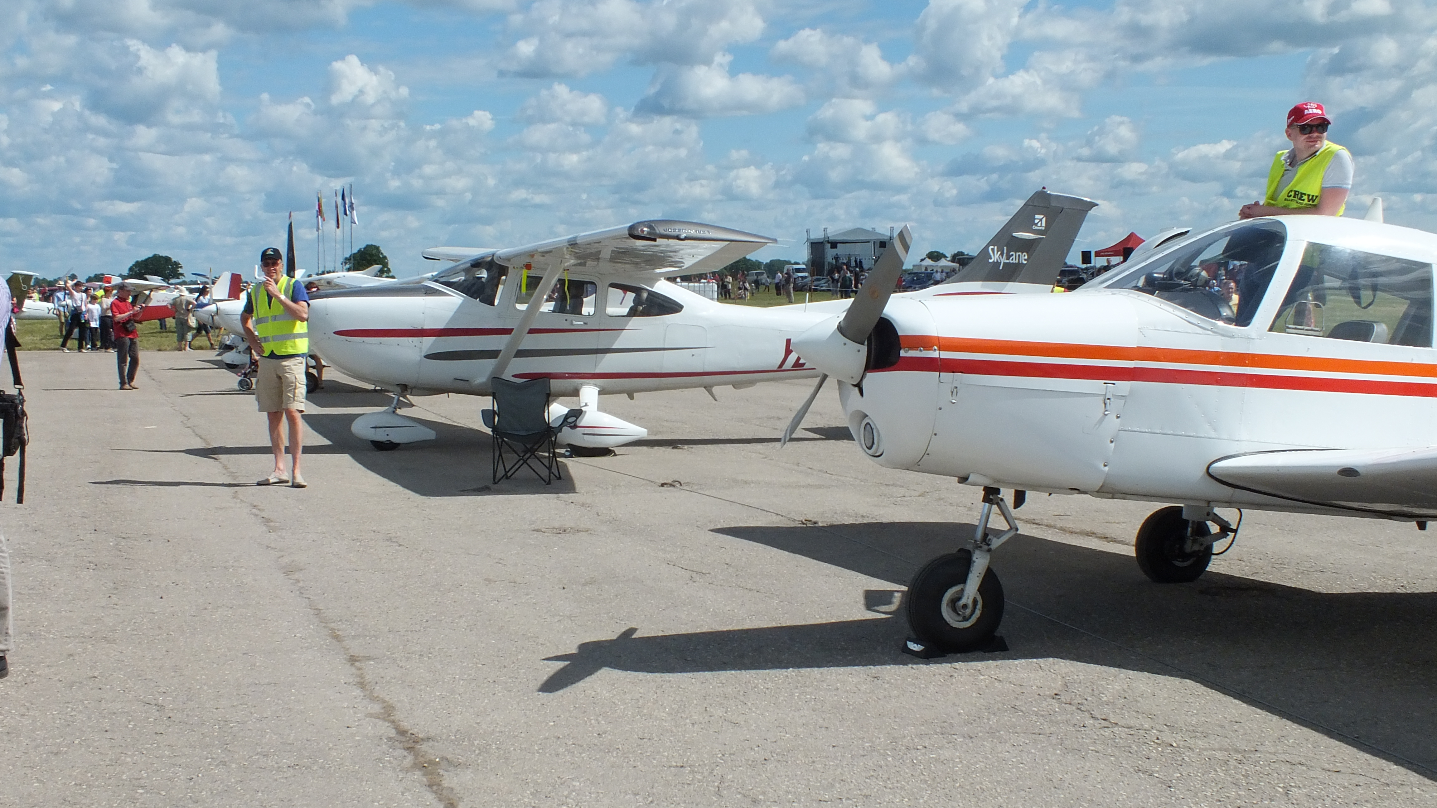 Lidmašīnu ekspozīcija aviācijas svētkos Degumnieku lidlaukā